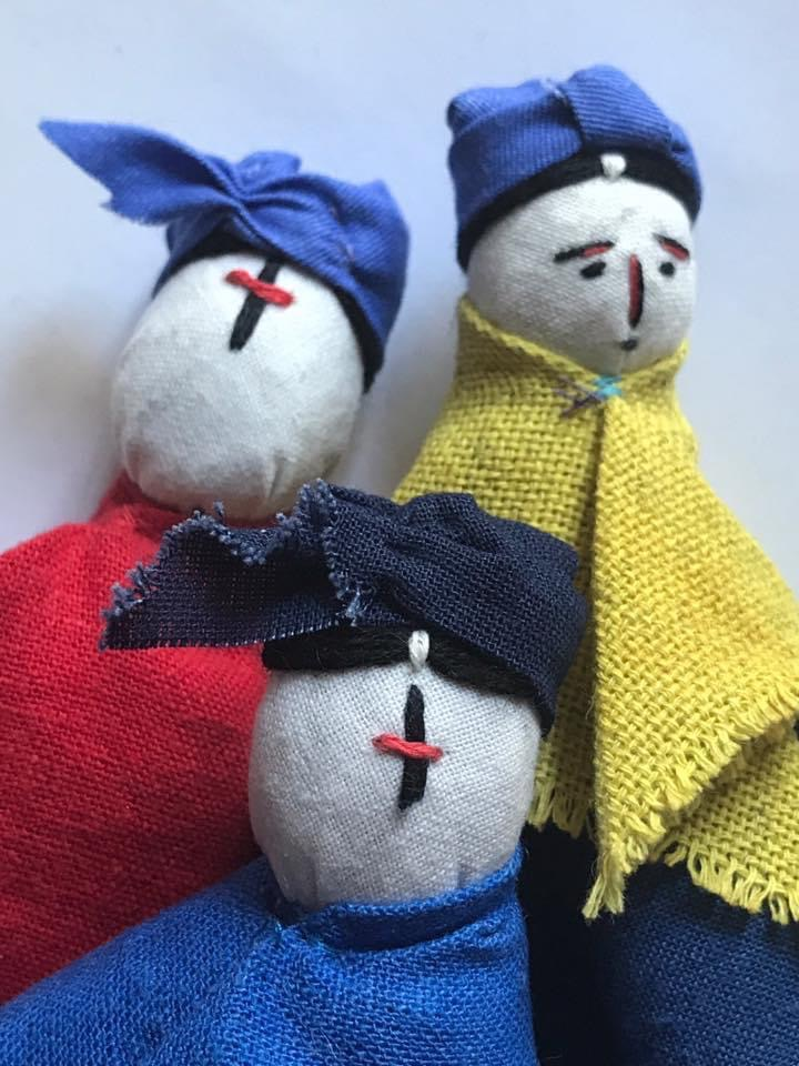 На цьому фото три реконструйовані українські народні ляльки з Полтавщини,с.Решитилівка,з зібрання М.Бартрама,початок ХХ ст.,оригінали знаходяться в музеї іграшок у Сергіівім Посаді